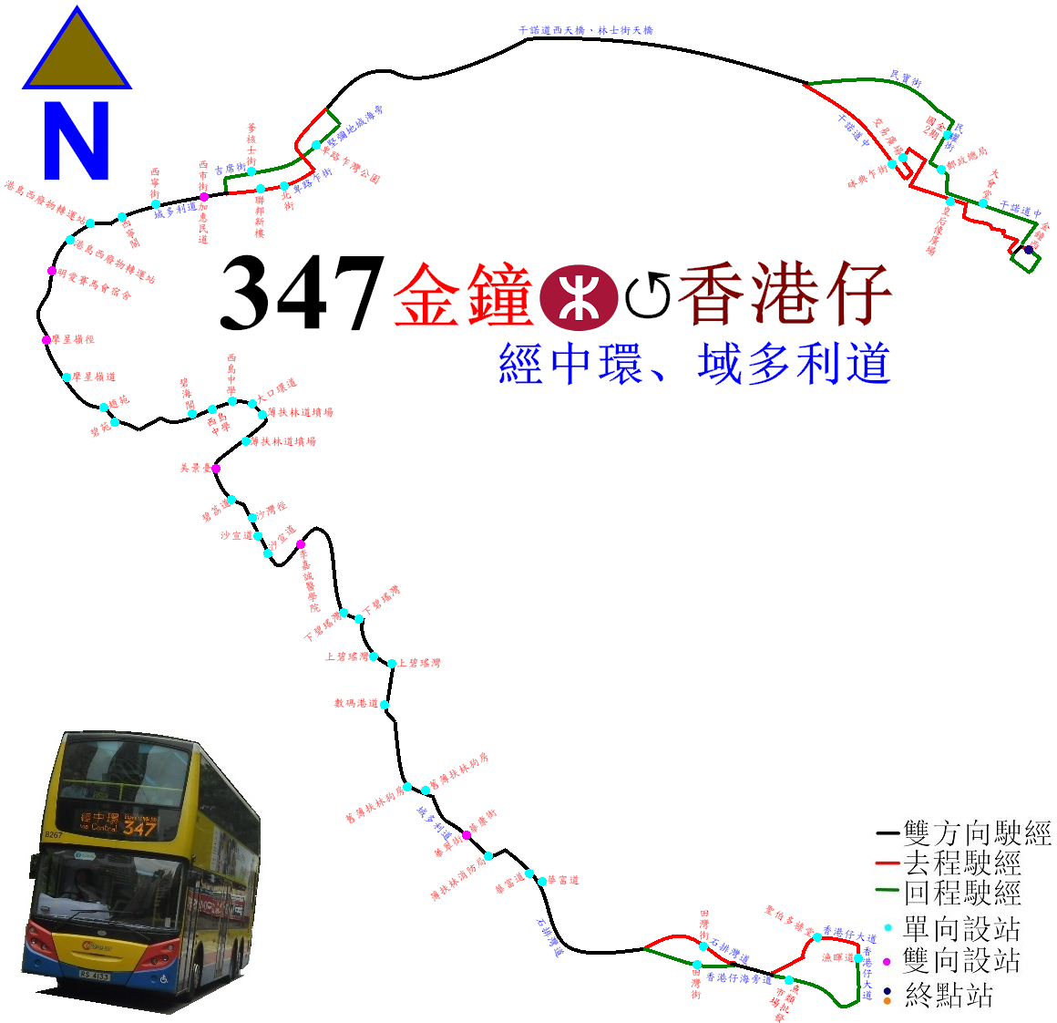 中文（香港）: 城巴347線的走線圖